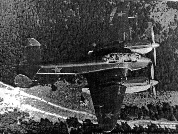 фотография Як-2 в полёте